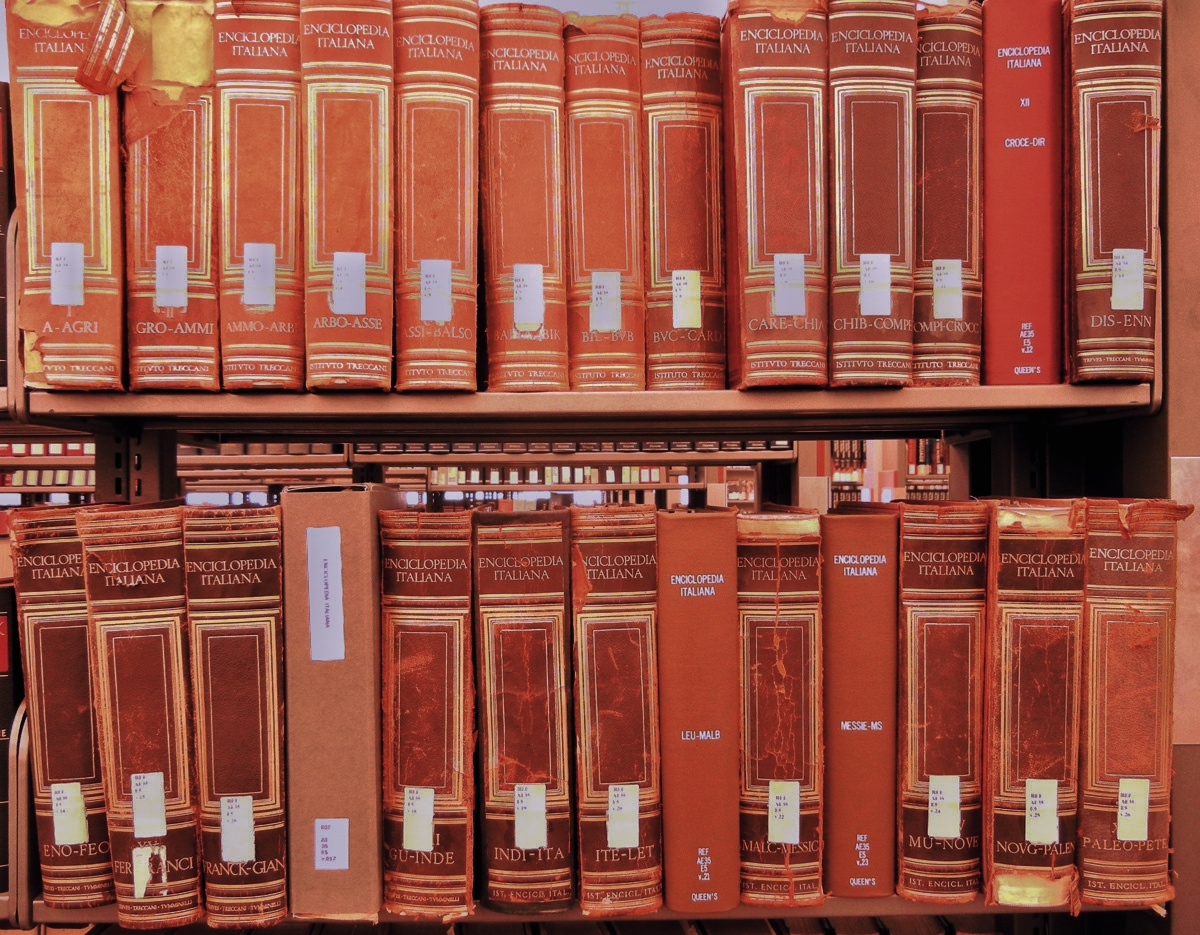 Les volumes de l'Enciclopedia italiana photographiés dans une bibliothèque canadienne en 2012.